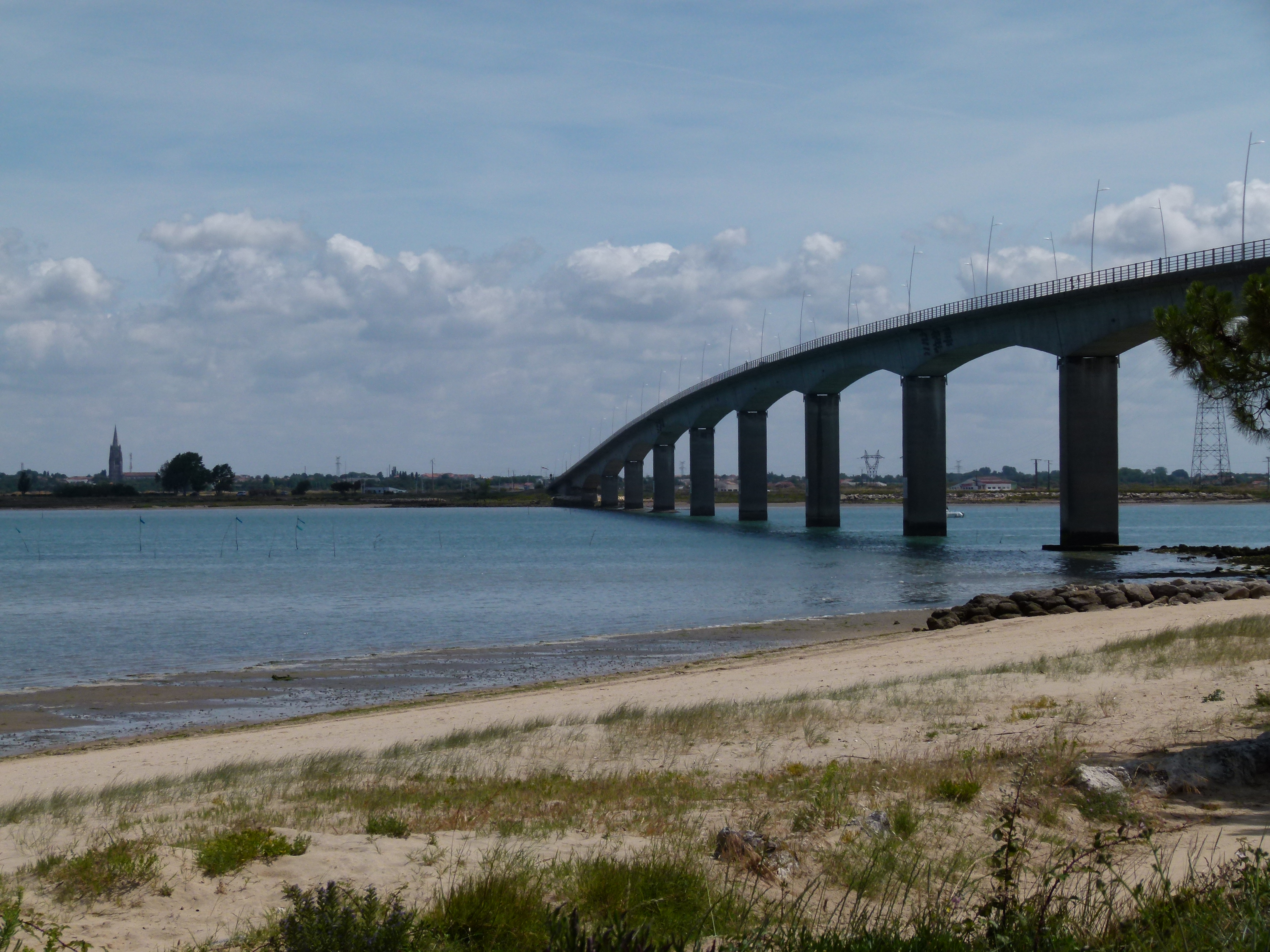 Le pont de la Seudre et au loin, sur la rive droite du fleuve, le clocher de l'église de Marennes (Charente-Maritime).